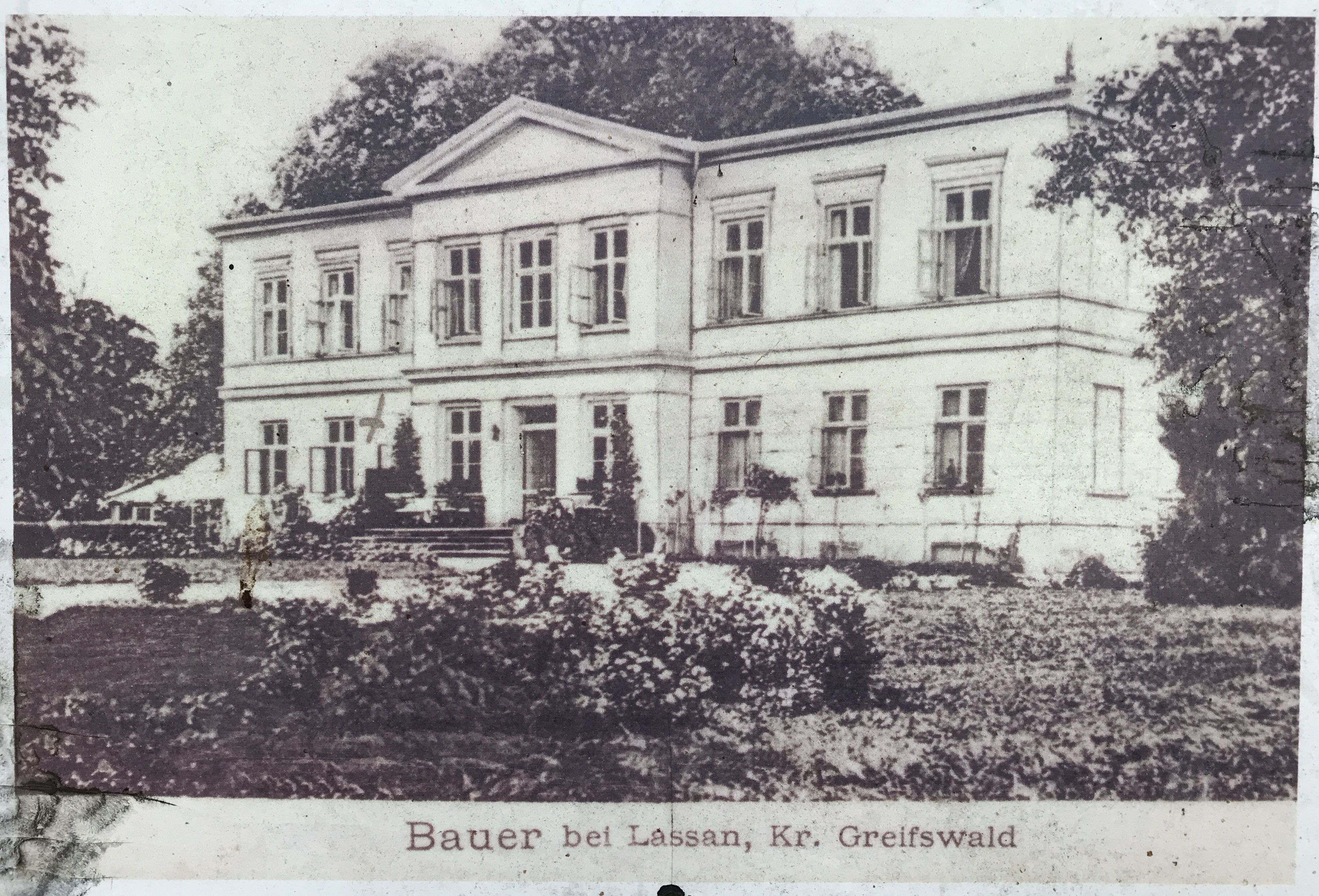 Das Gutshaus in Wehrland der Gemeinde Zemitz in Mecklenburg-Vorpommern ist ein Herrenhaus aus den Jahren 1837 und 1838. Die Aufnahme erfolgte auf einer öffentlich zugänglichen Informationstafel vor dem Gutshaus, die vom Naturpark Insel Usedom als Naturlehrpfad Ostseeküste vermarktet wurde.